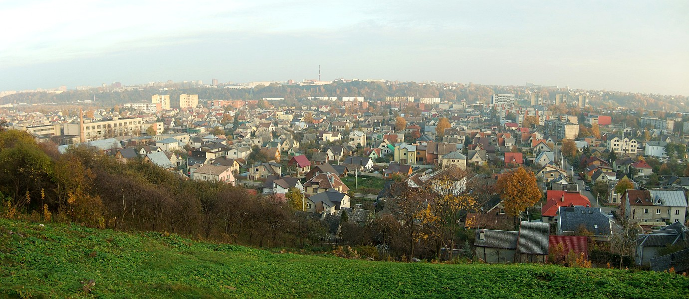 Kauno rajonas Vilijampolė.